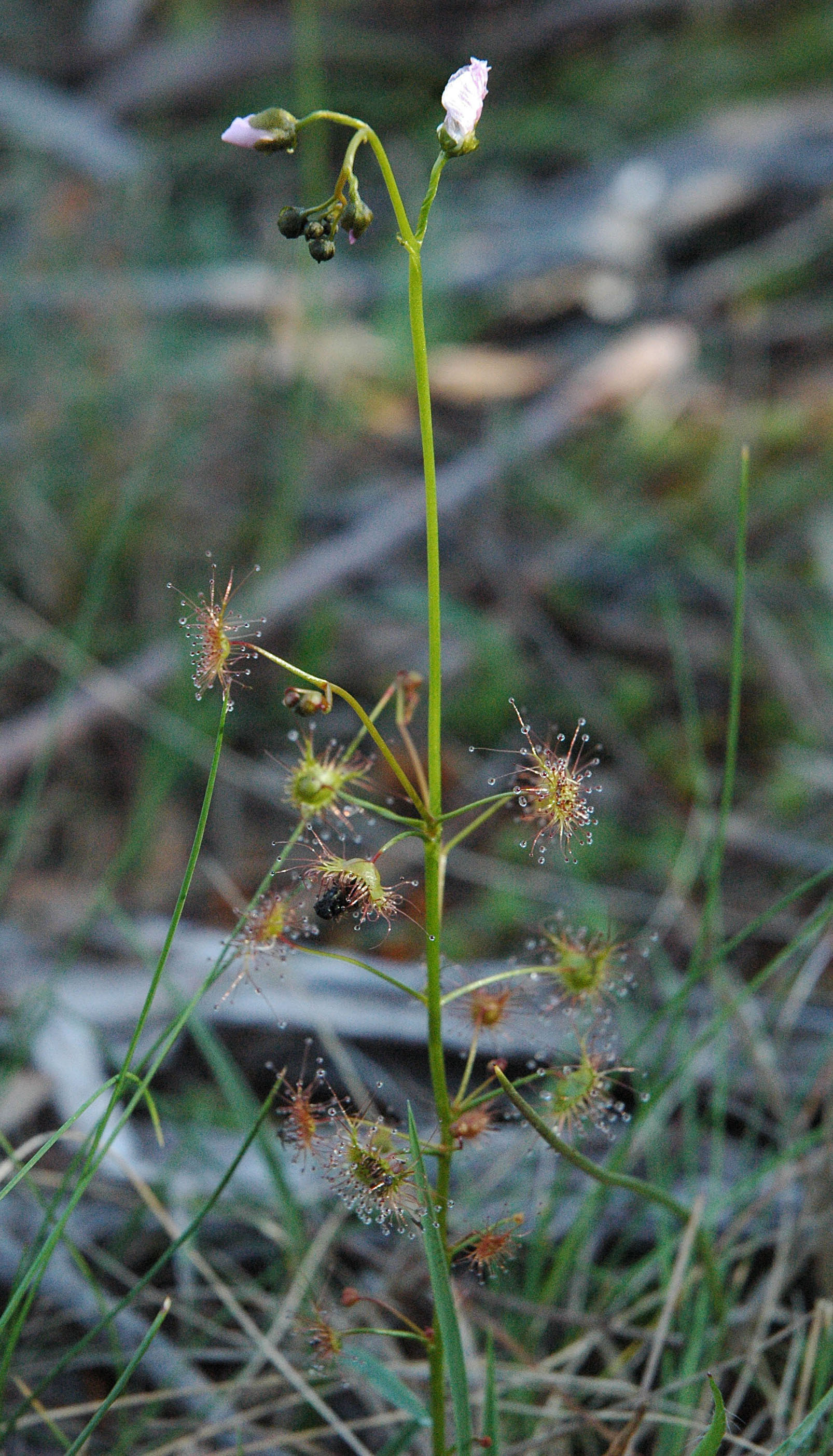 Tall Sundew, Drosera peltata subsp. auriculata. Tasmania.